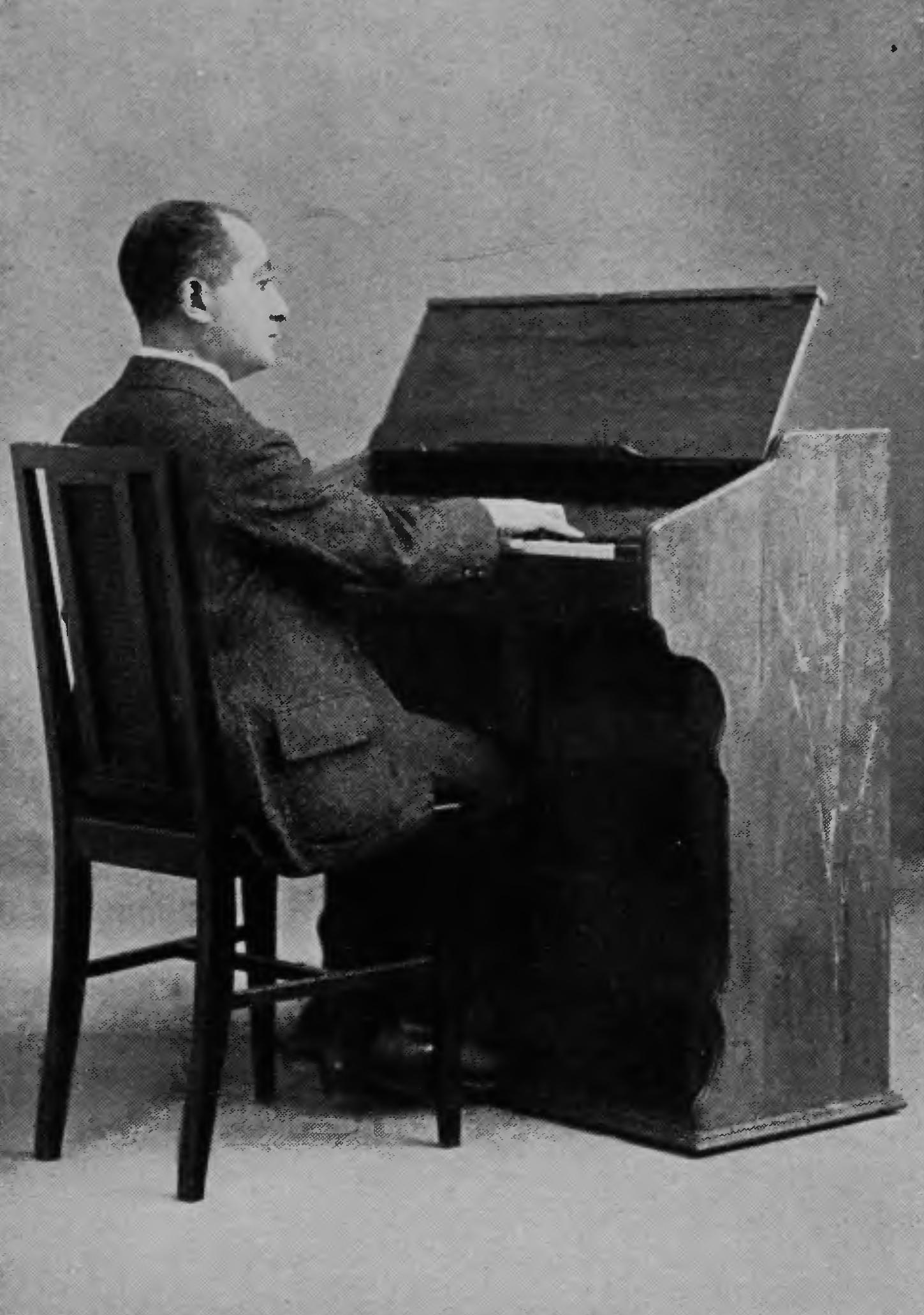 André Benoist